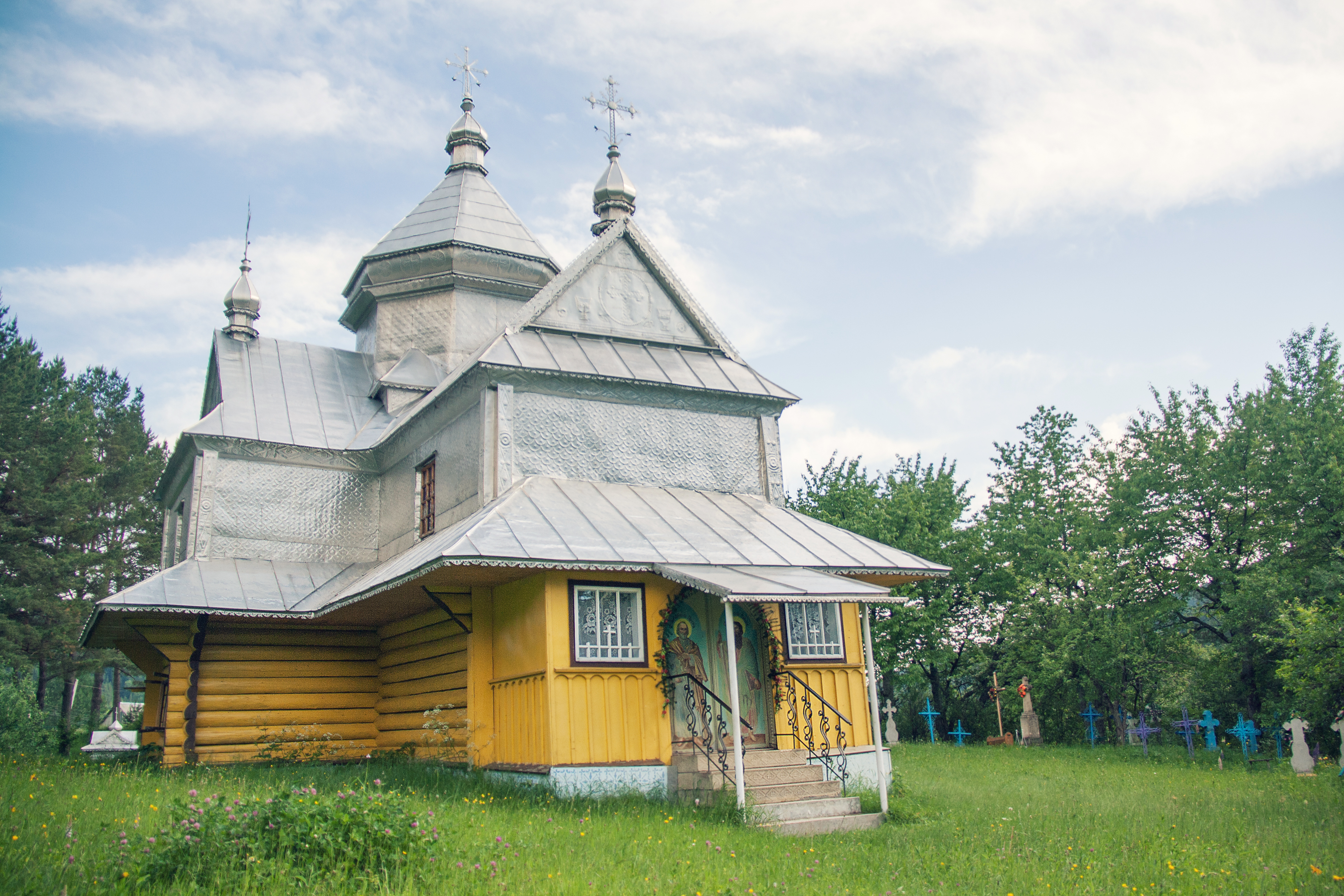 Iglesia Ortodoxa. Berezhnytsya, Ucrania